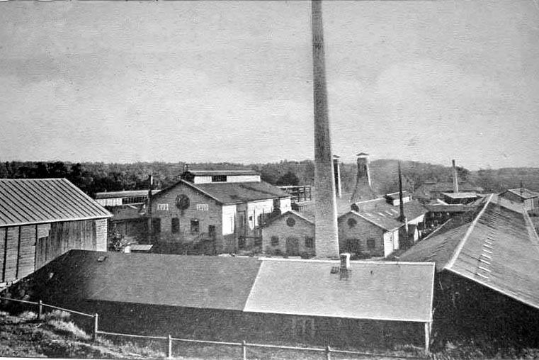 Kockums Jernverk i Kallinge, 1900-talets början. Foto efter gammalt vykort.